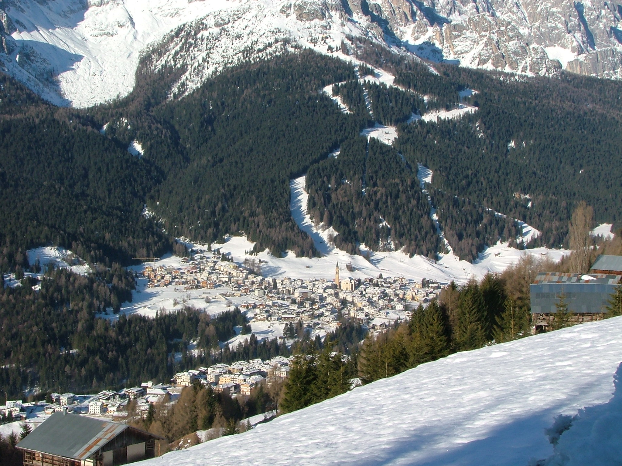 Padola di Comelico Superiore, Belluno, Veneto, Dolomites, Italy